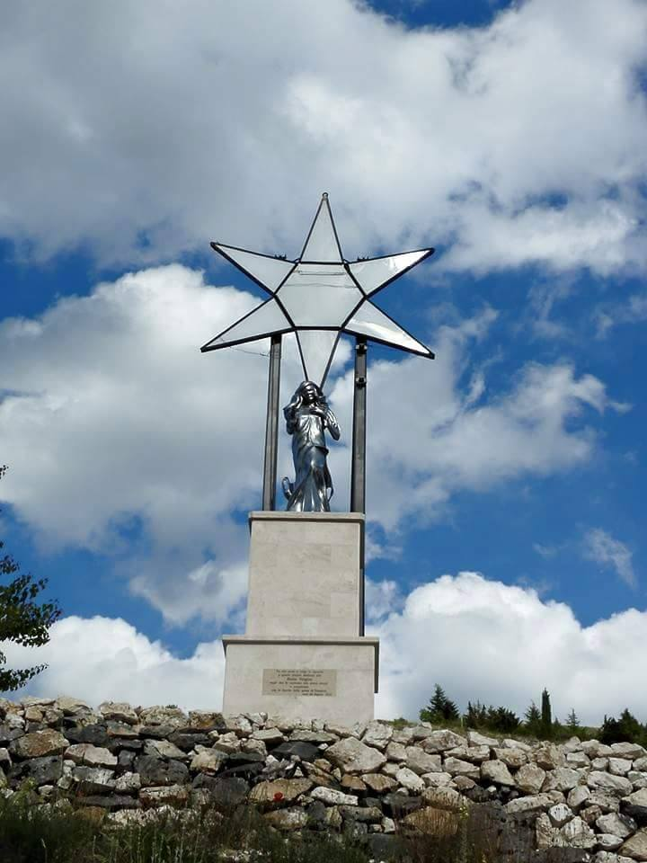 Monumento della stella e statua della Madonna della Pellegrina